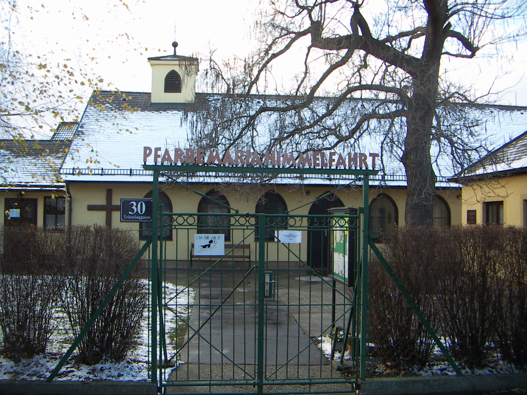 Maria-Himmelfahrt-Kirche (Wien)